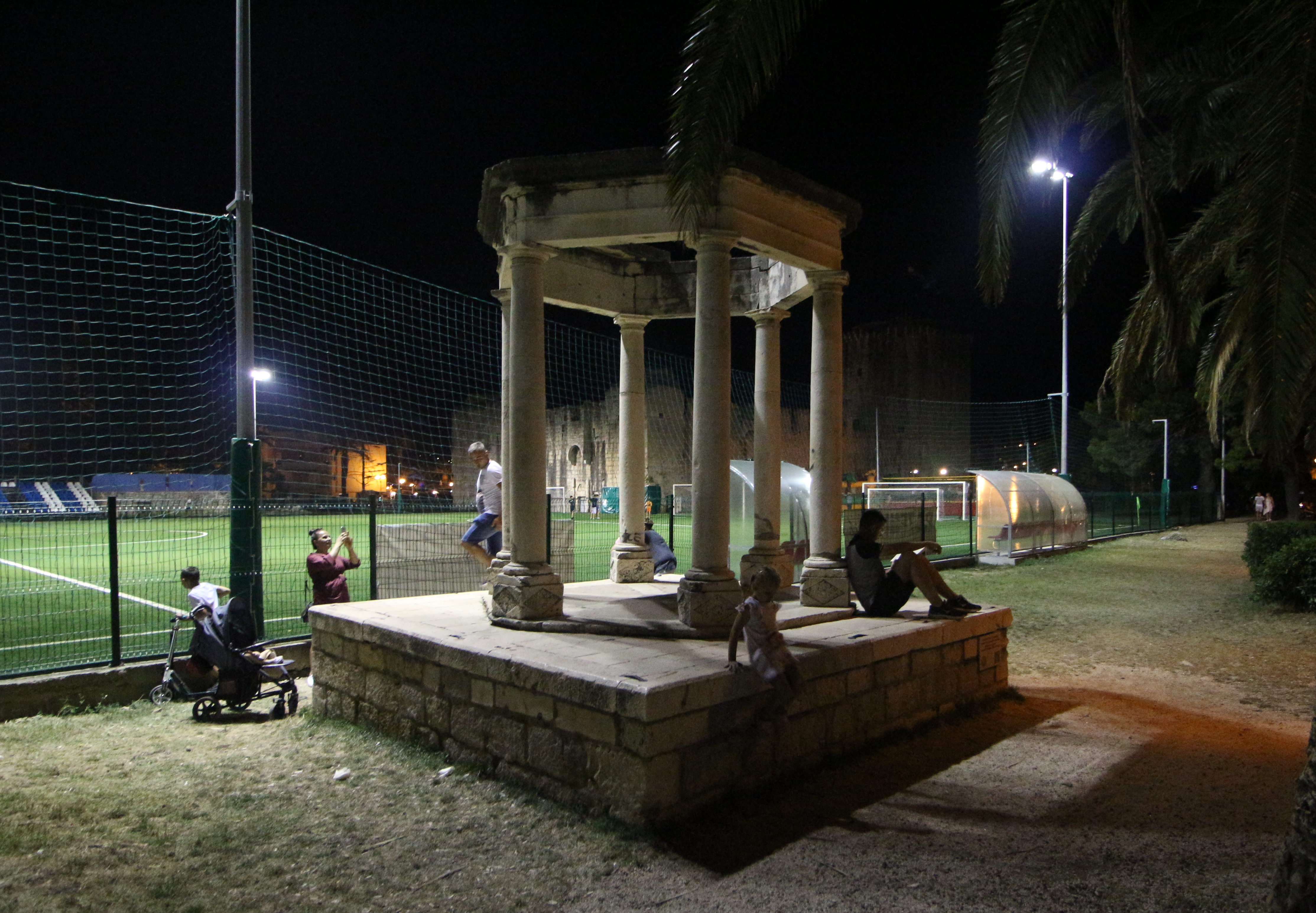 Trogir gloriet maršála Marmonta